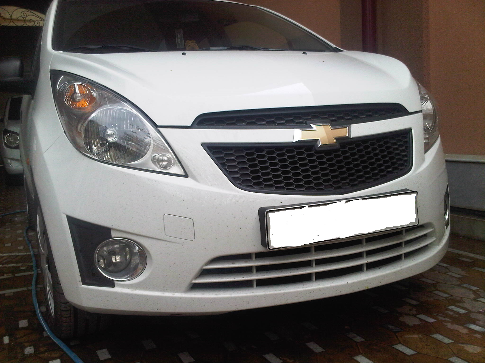 Oʻzbekcha/ўзбекча: Car